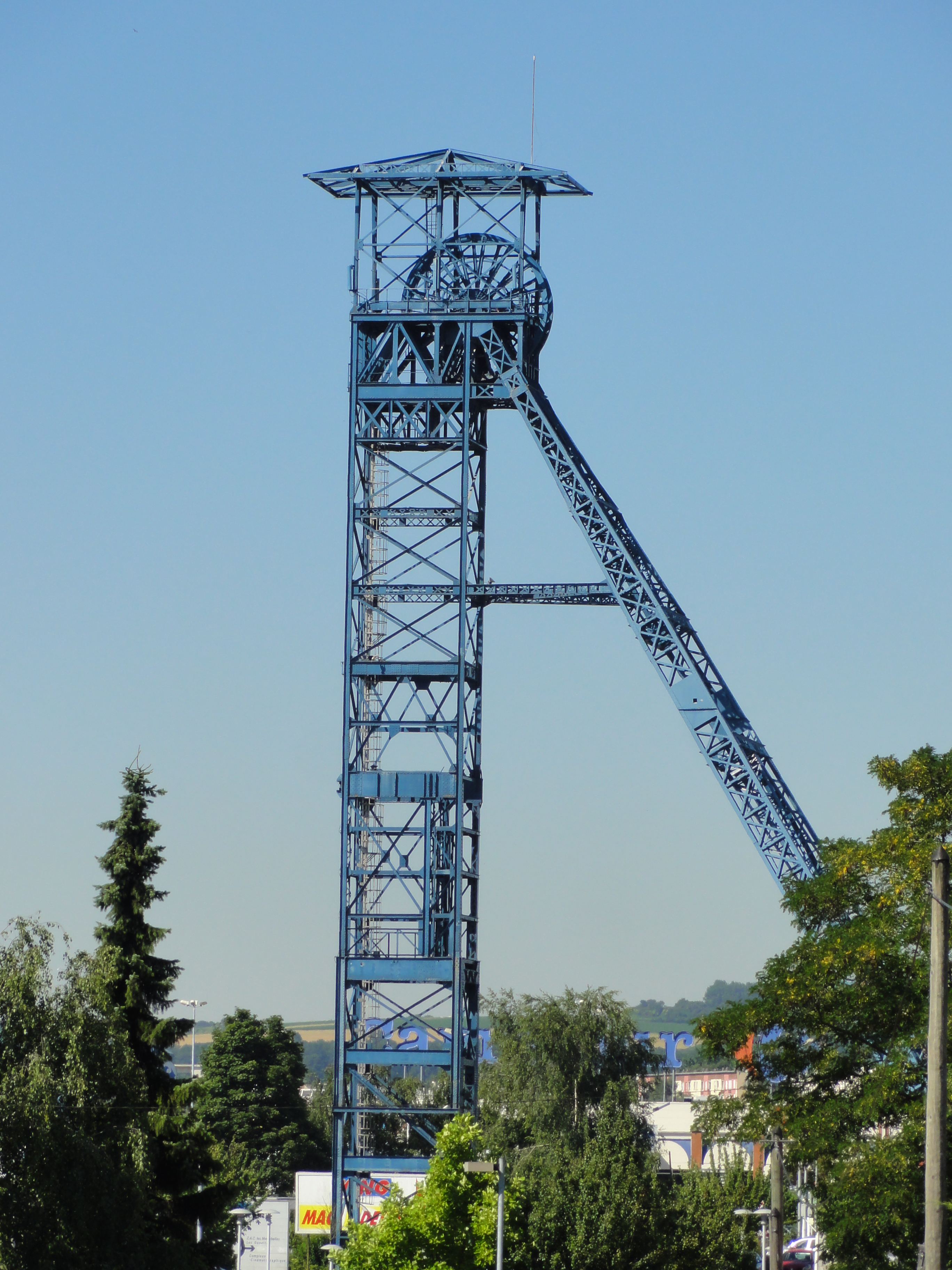 La fosse n° 1 - 1 bis - 1 ter de la Compagnie des mines de Liévin était un charbonnage du bassin minier du Nord-Pas-de-Calais constitué de trois puits situé à Liévin, Pas-de-Calais, Nord-Pas-de-Calais, France. .